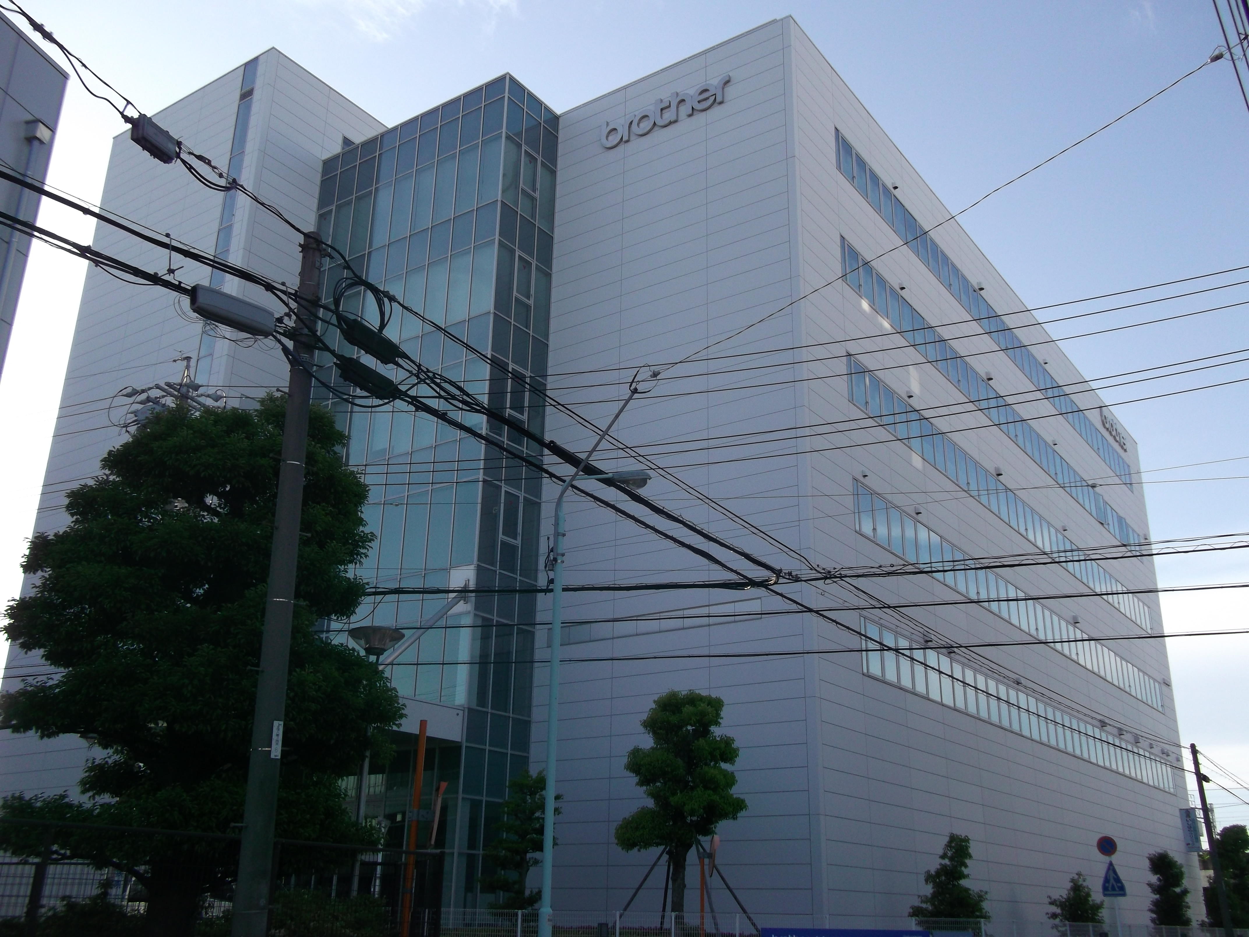 名古屋市瑞穂区桃園町のエクシング本社東側公道南側から写す